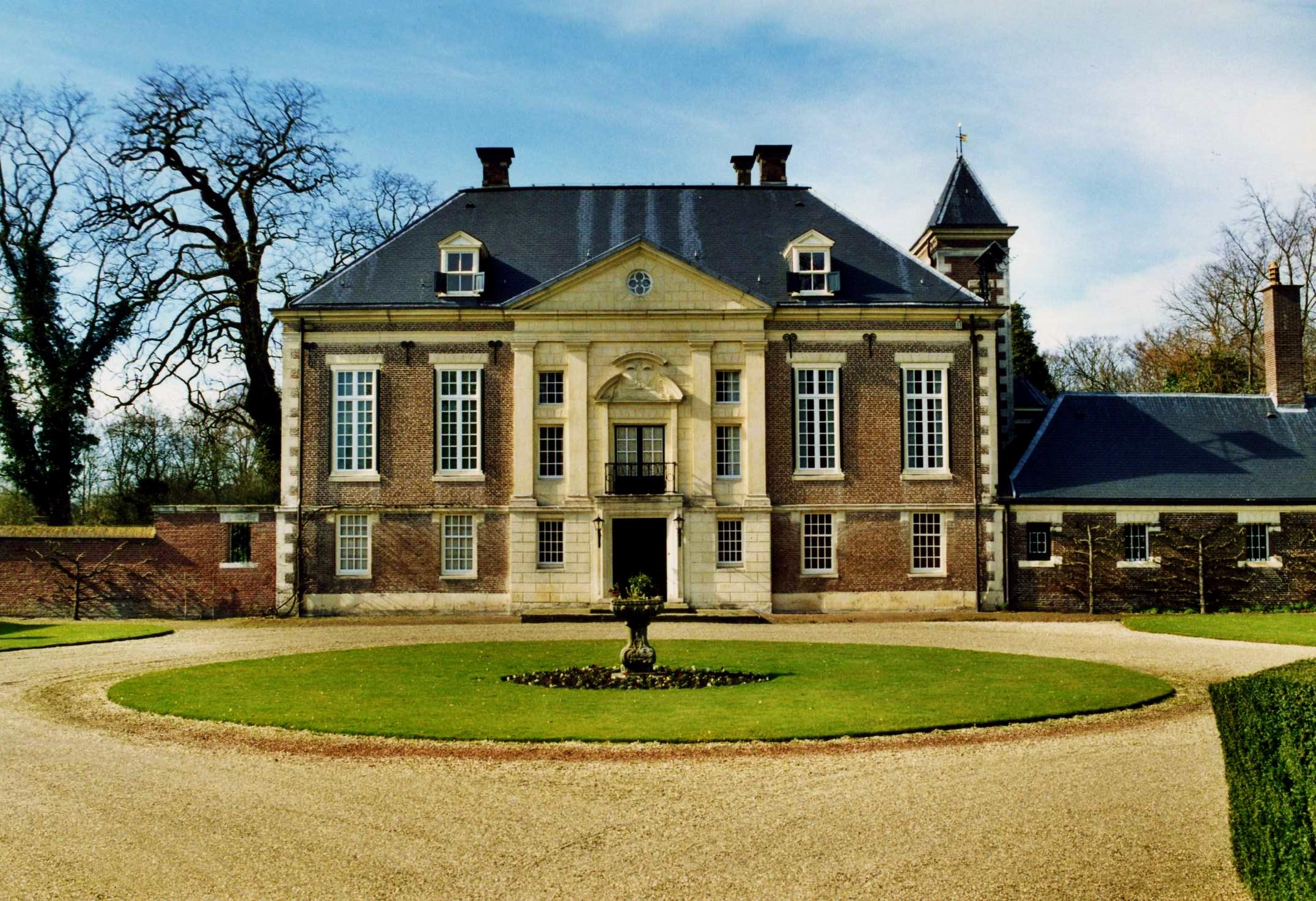 Kasteel Diepenheim te Diepenheim.